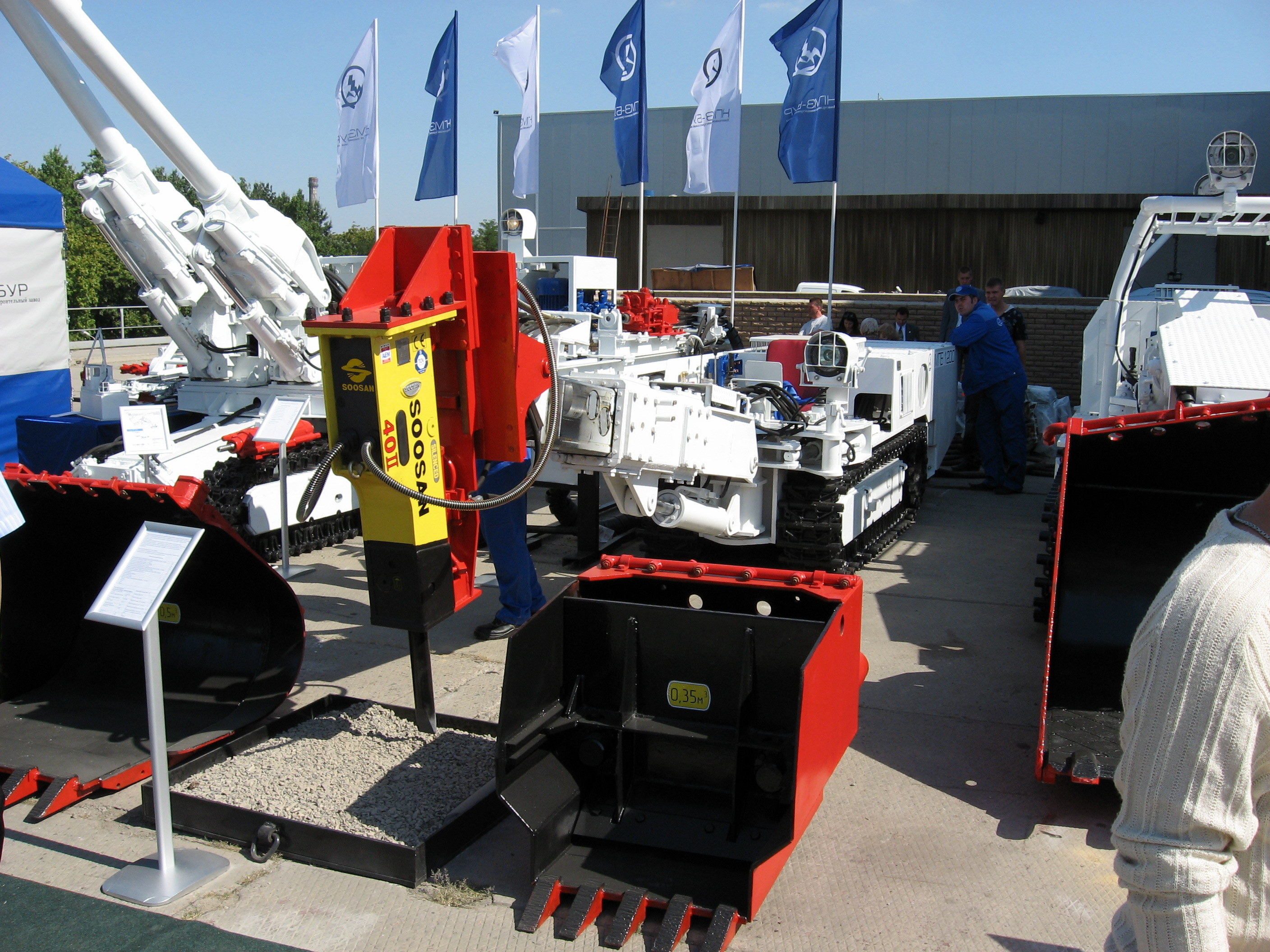 Фото з виставки Вугілля-Майнінг 2008